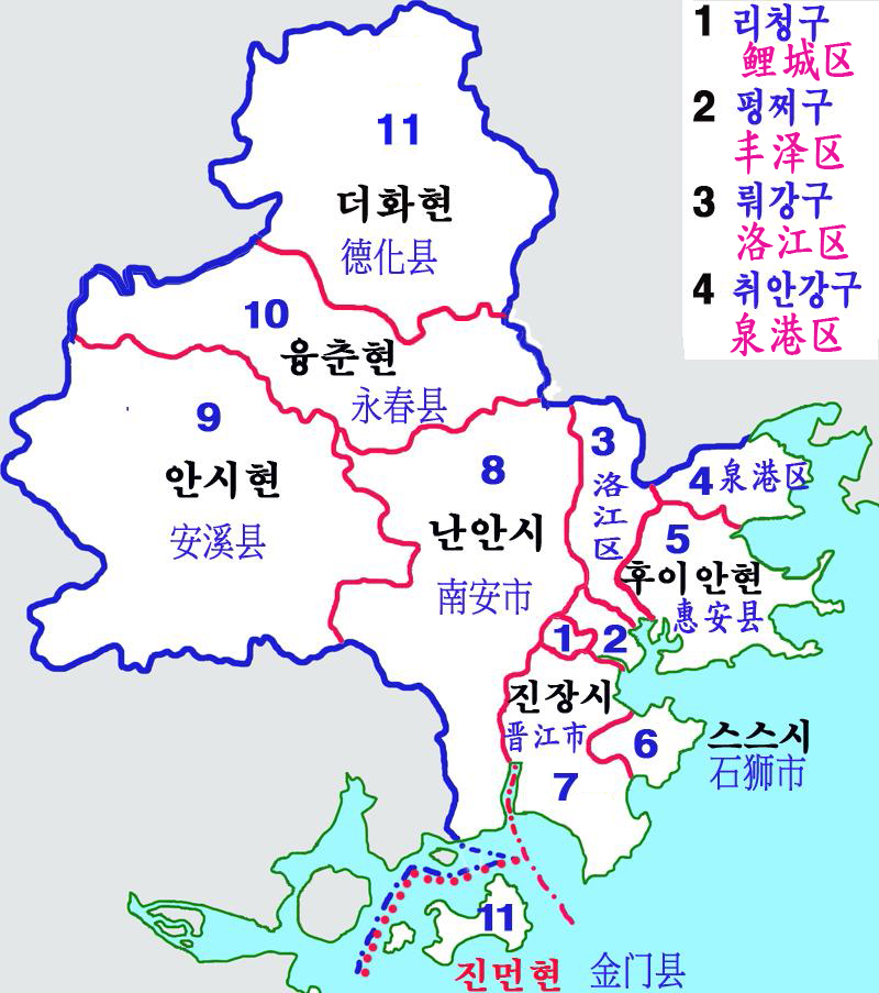 푸젠성 취안저우시 현급구역도